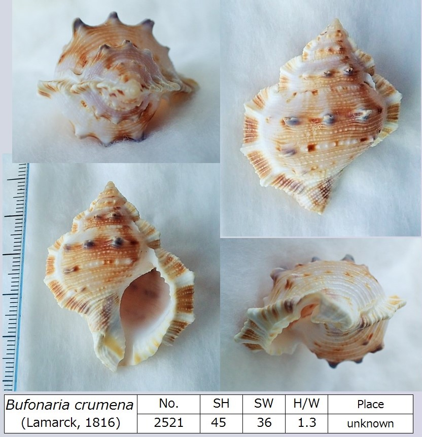 購入品のため産地は不明。